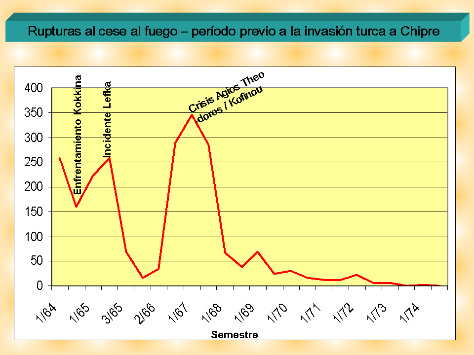 Rupturas al cese al fuego en Chipre entre los años 1964 y 1974. Confeccionado sobre la base de los informes del Secretario General de las Naciones Unidas en el período correspondiente.